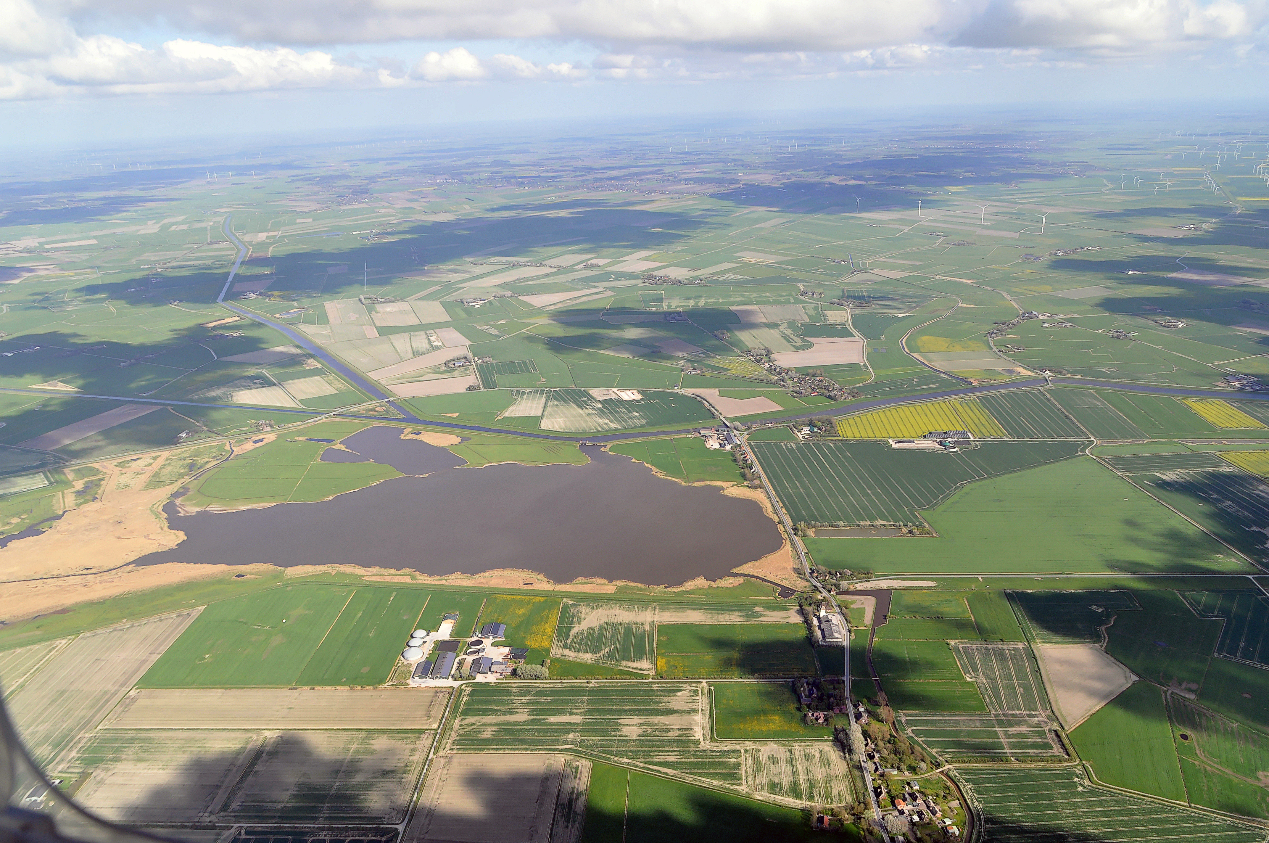 Luftbilder von der Nordseeküste 2012-05